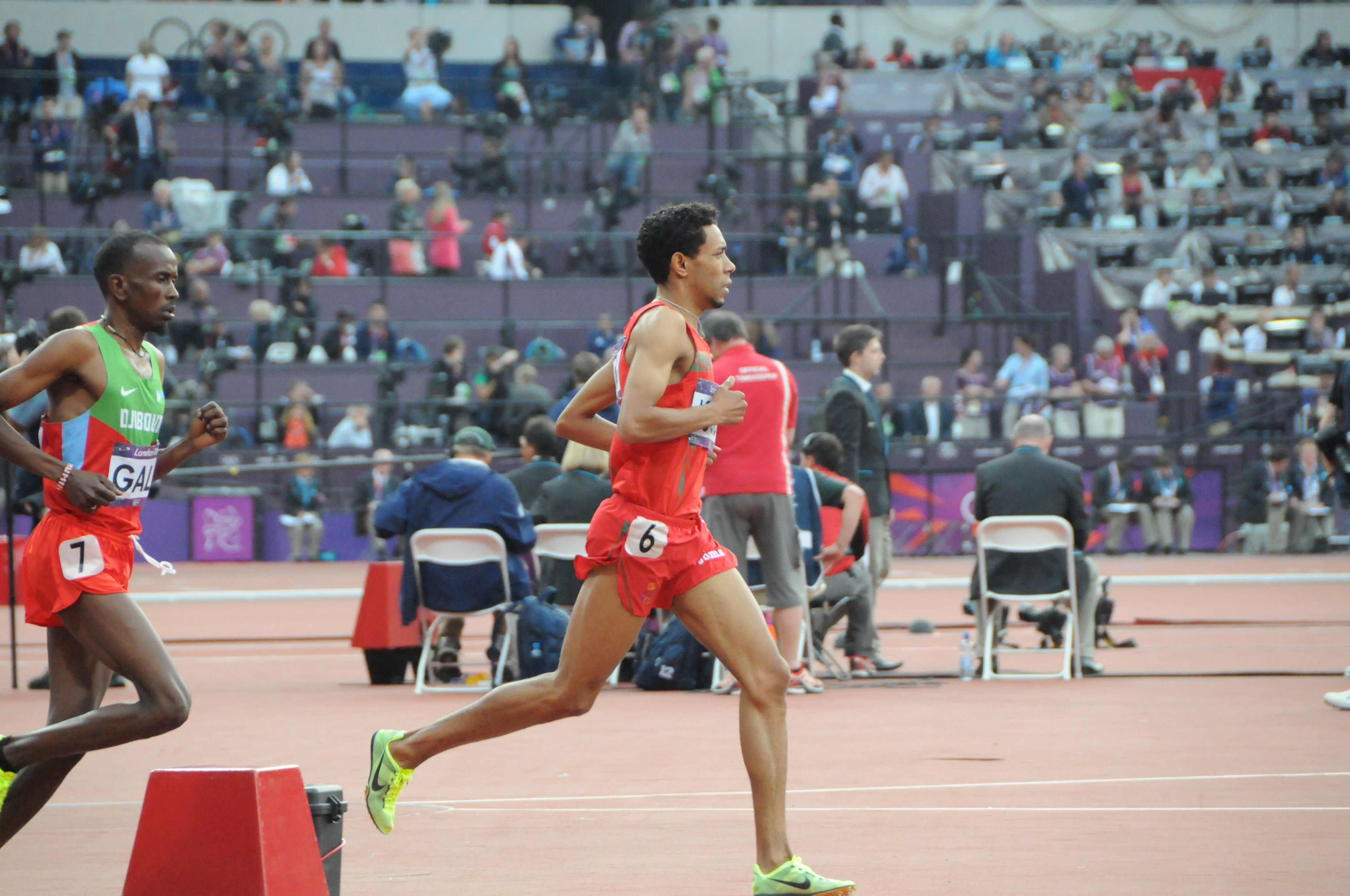 Course du 5000m des jeux olympique de Londres. On voit le marocain Abdalaati Iguider en rouge.